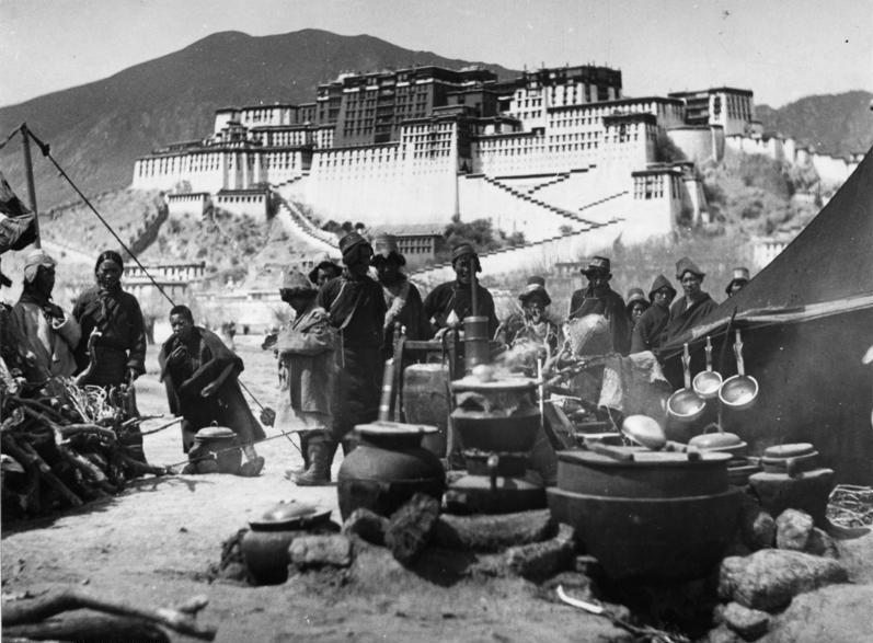 Lhasa, Feldküche